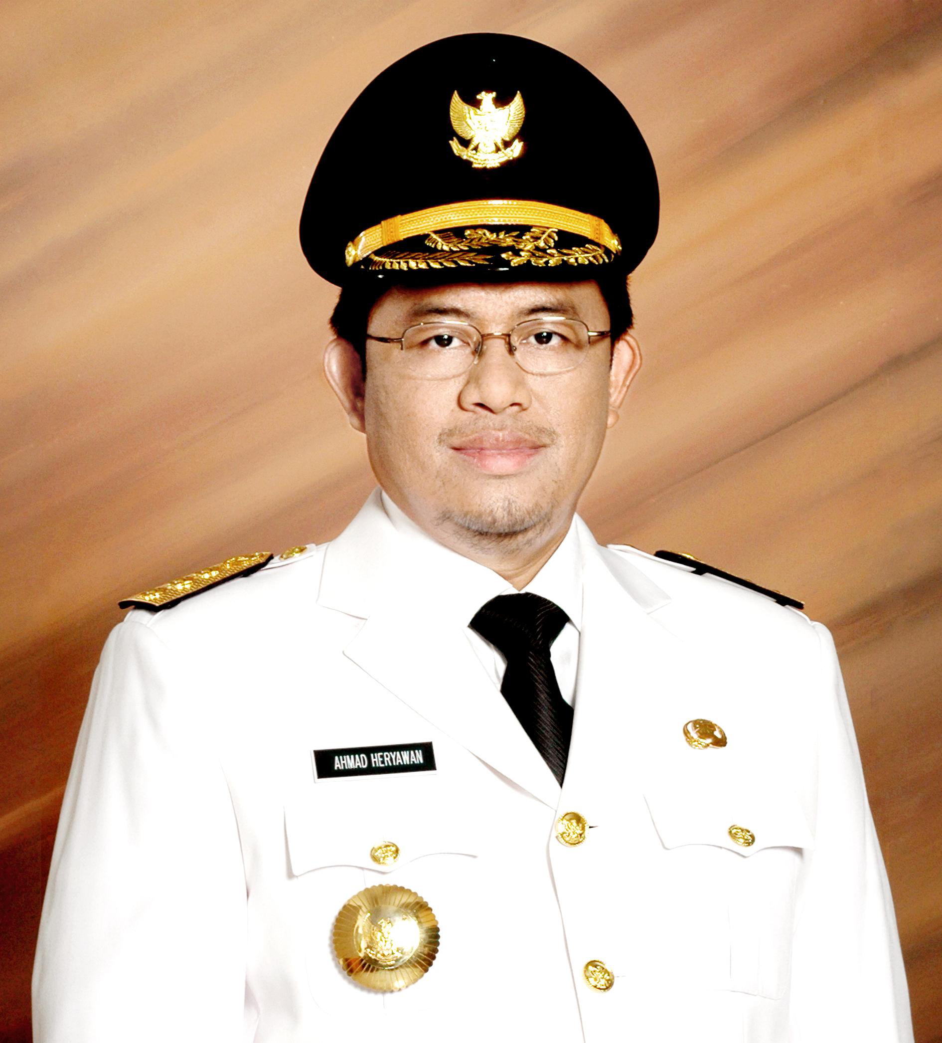 Ahmad Heryawan, Gubernur Jawa Barat 2008-2013 dan 2013-2018